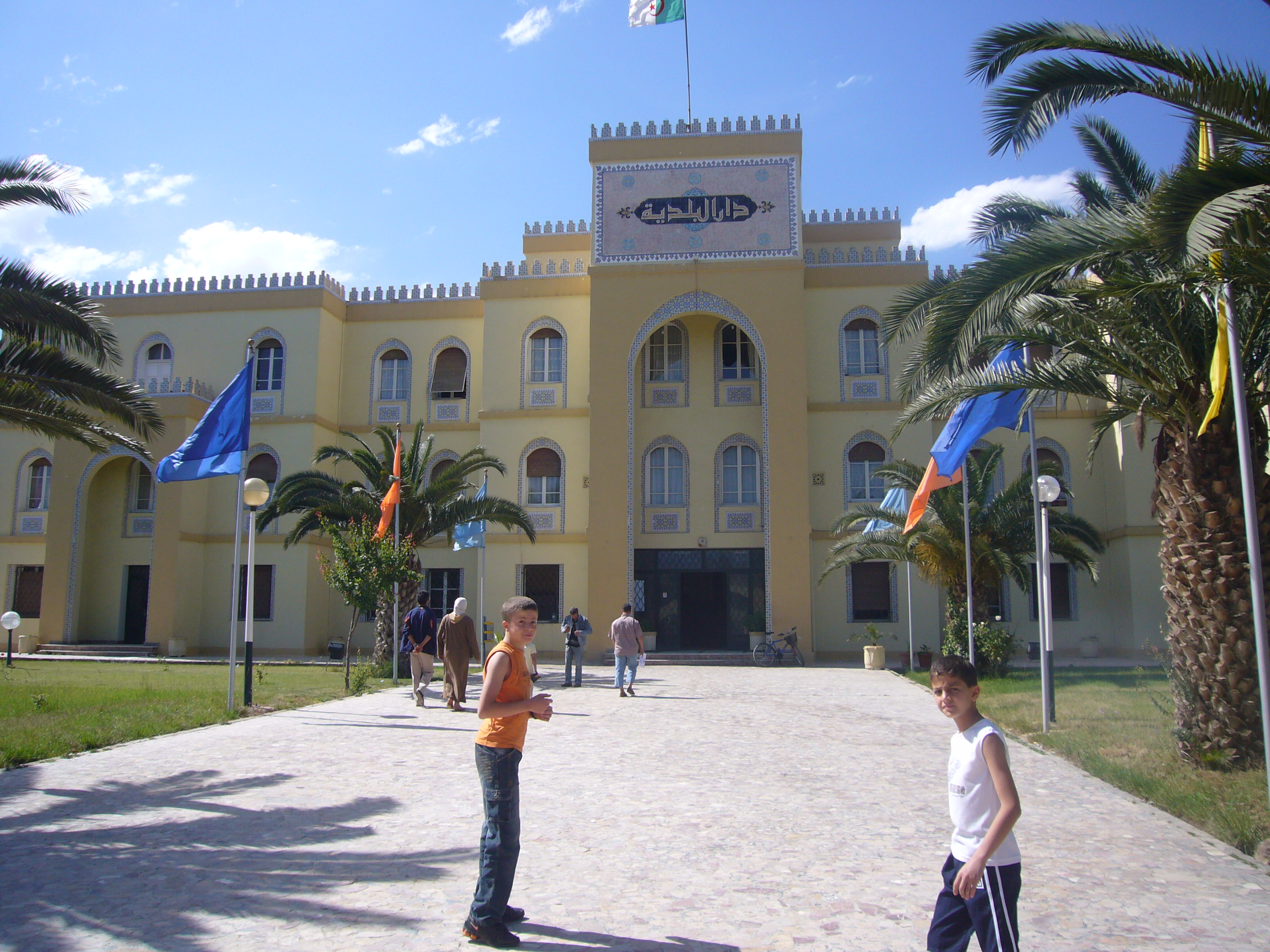 Hôtel de ville Tlemcen